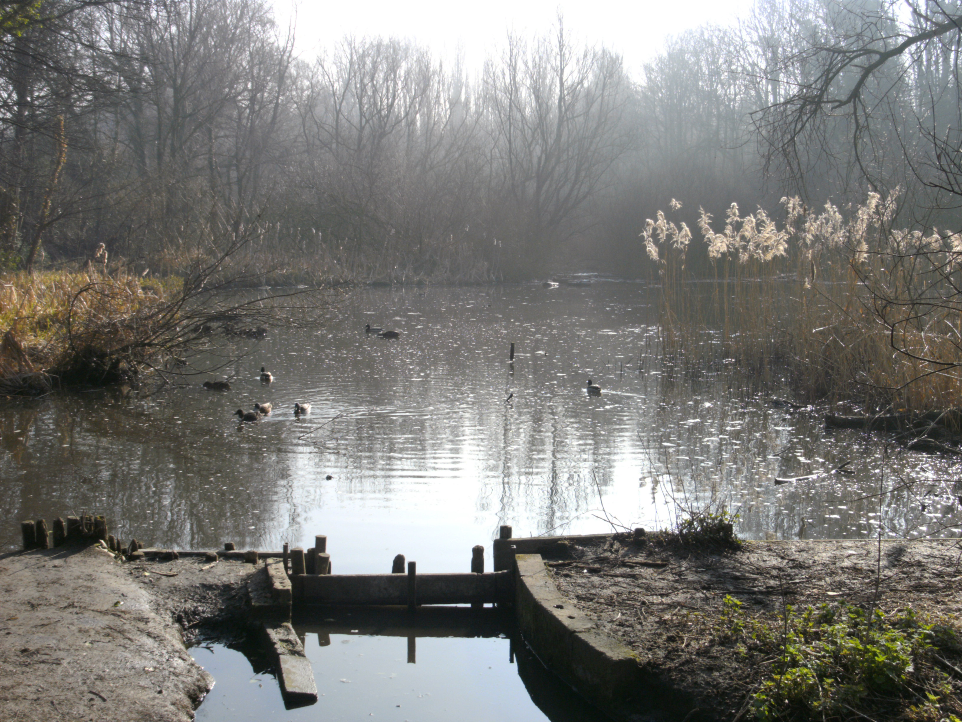 Parc naturel du Moeraske - l'étang